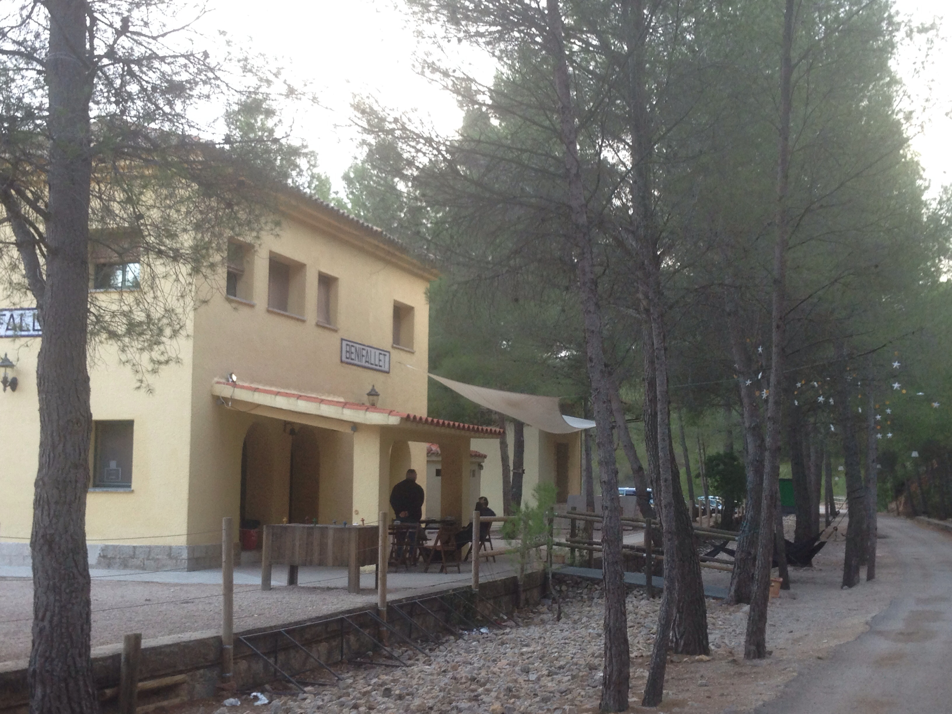 Antigua estación de Benifallet.